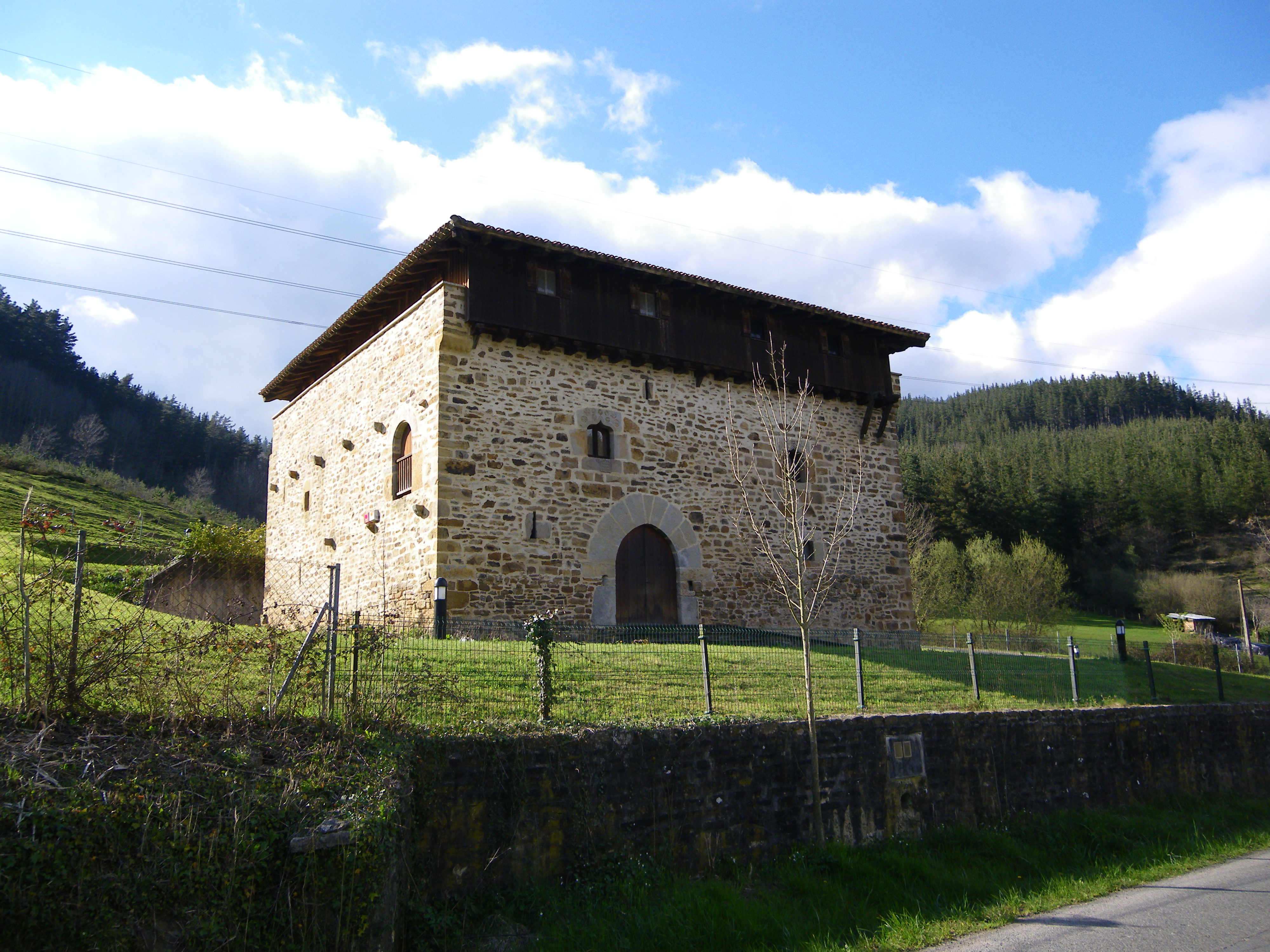 Negorta dorrea, Zuhatza, Aiara, Araba, Euskal Herria.